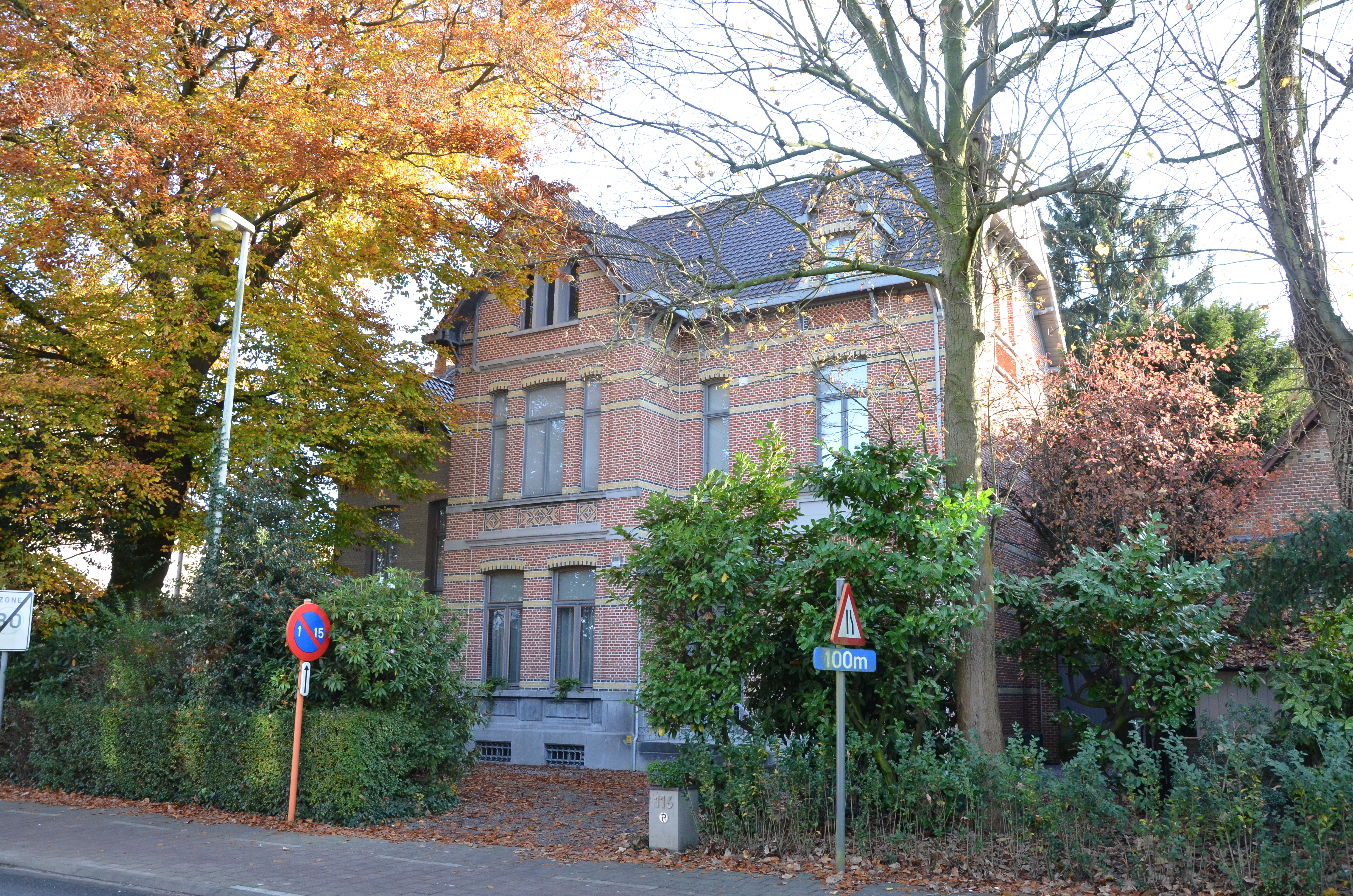 Landhuis Bloemenhof ca. 1901